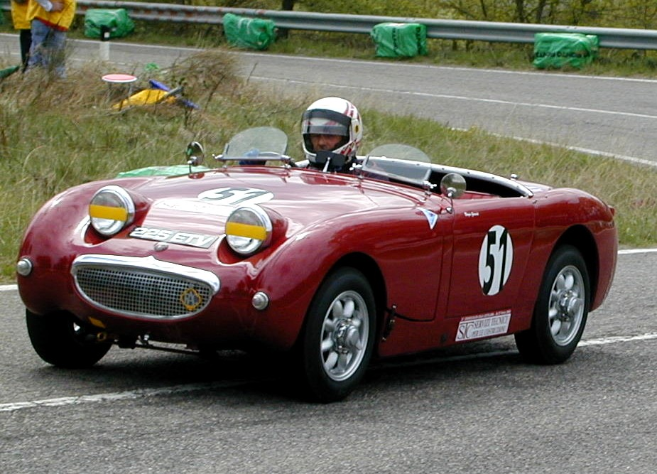 Una Austin-Healey Sprite preparata per le competizioni di auto storiche durante la Cronoscalata della Castellana (Orvieto)